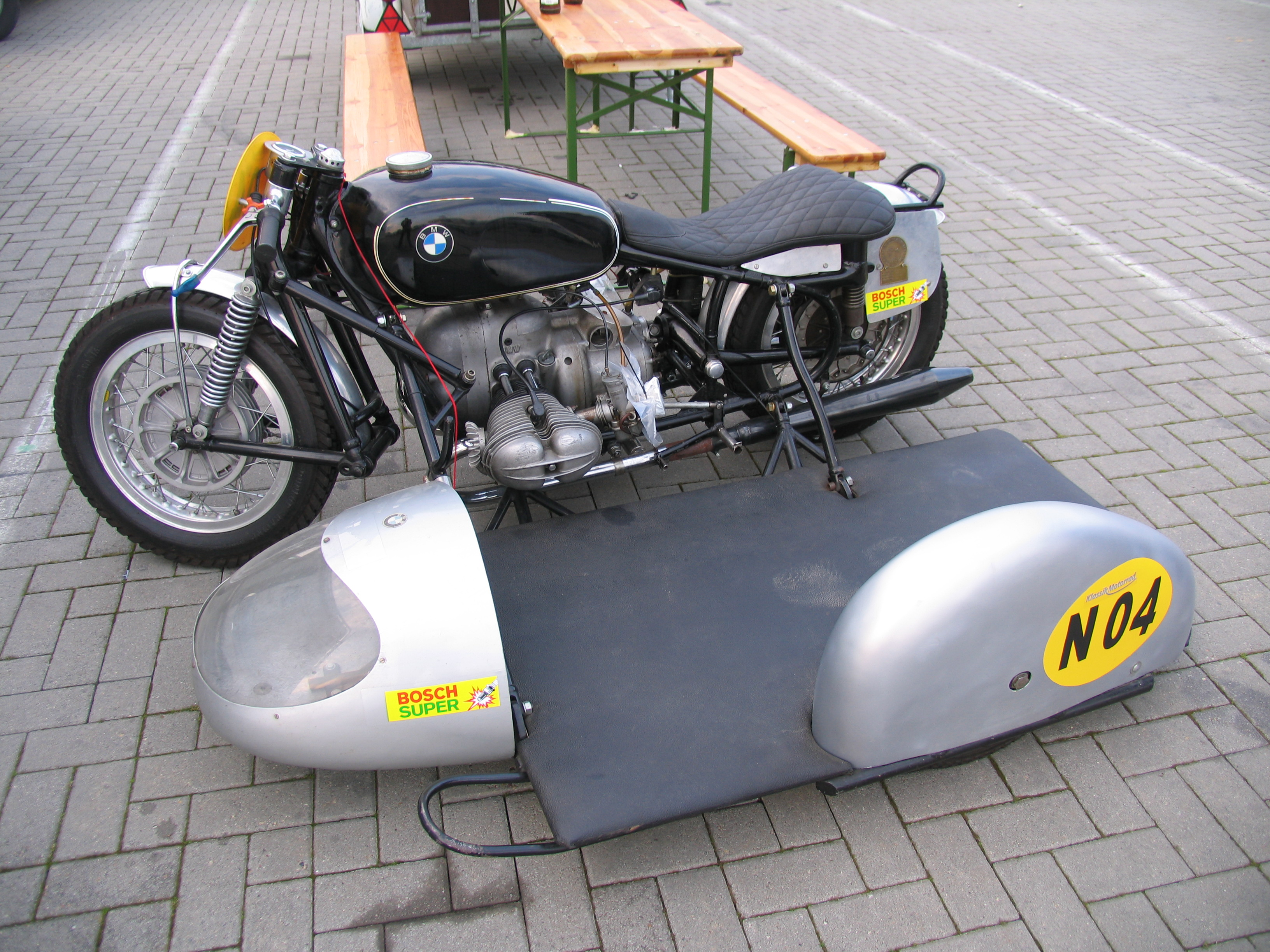 BMW Renngespann Sonstiges: Baujahr 1958